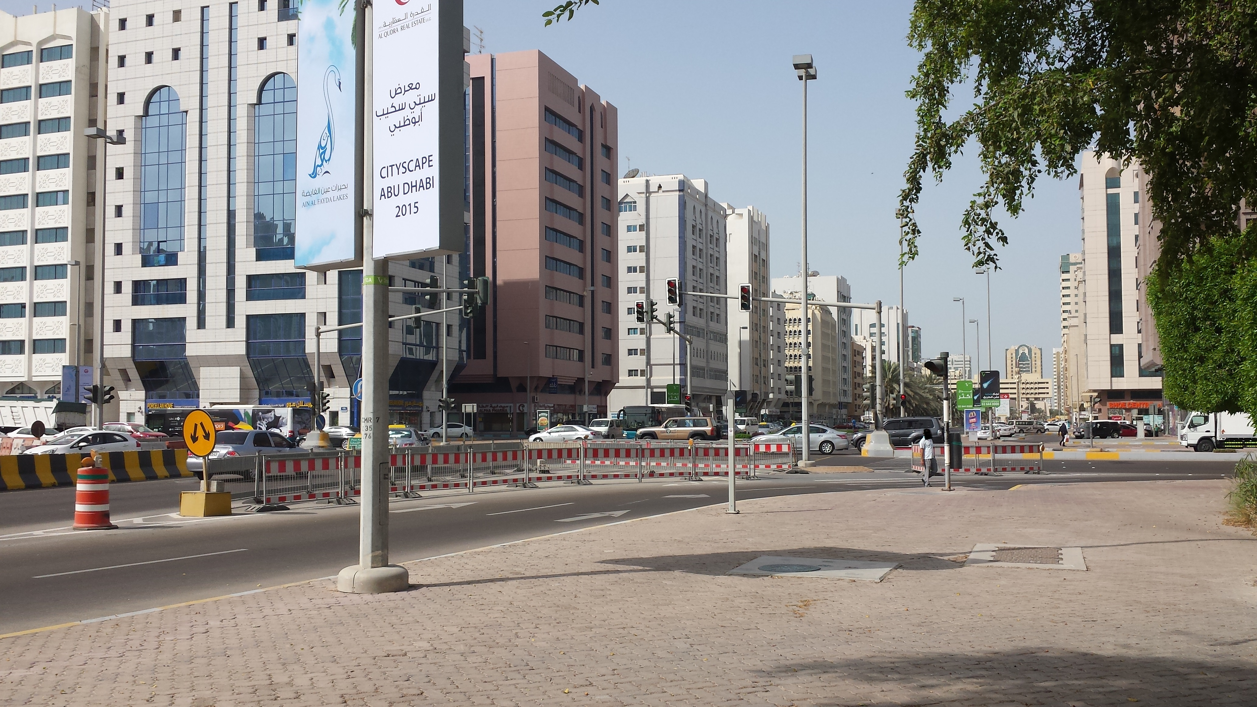 Near Abudhabi Mall - UAE